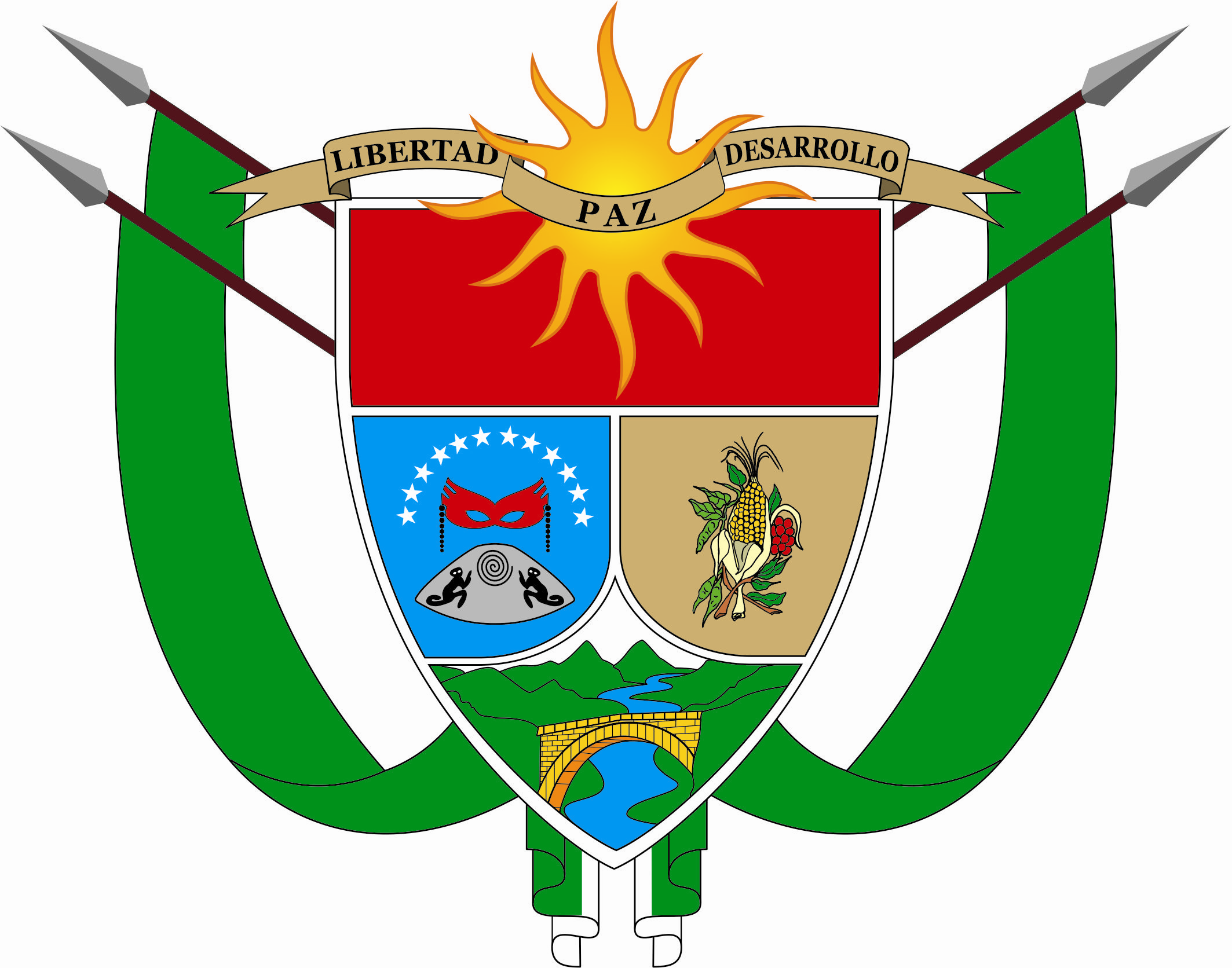 Escudo Oficial del Municipio de Buesaco adoptado en el año 2011